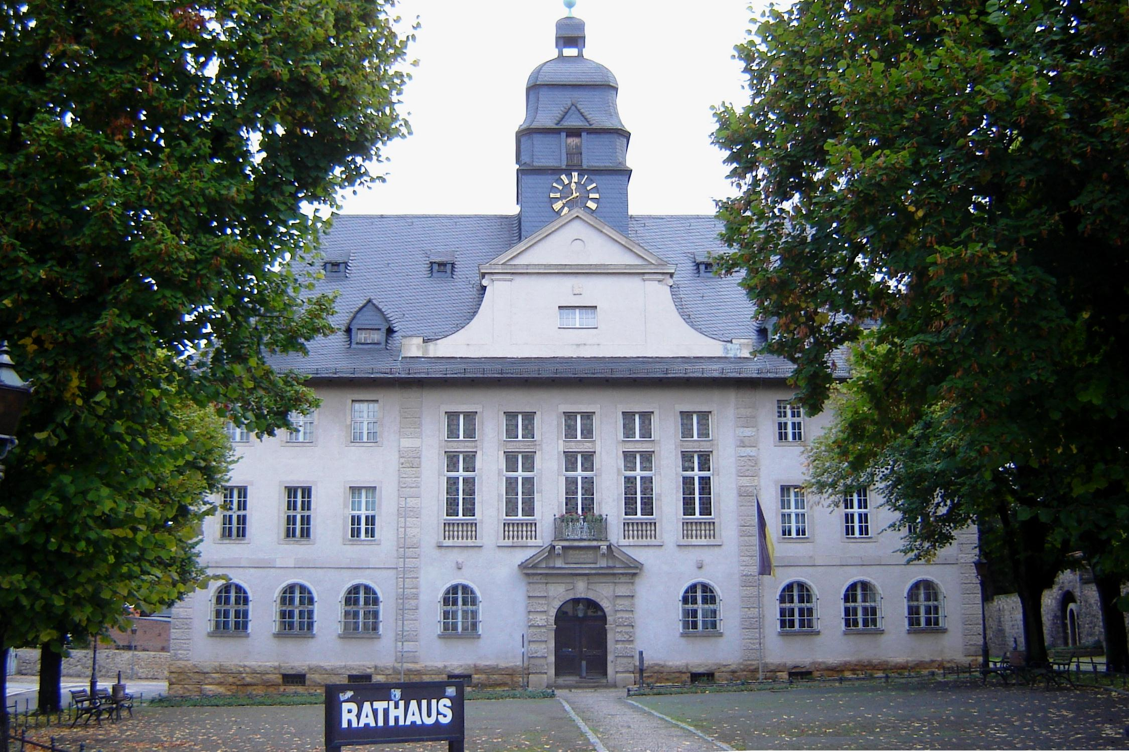 Ballenstedt, Rathausplatz 12, Ratuhaus (Kulturdenkmal)